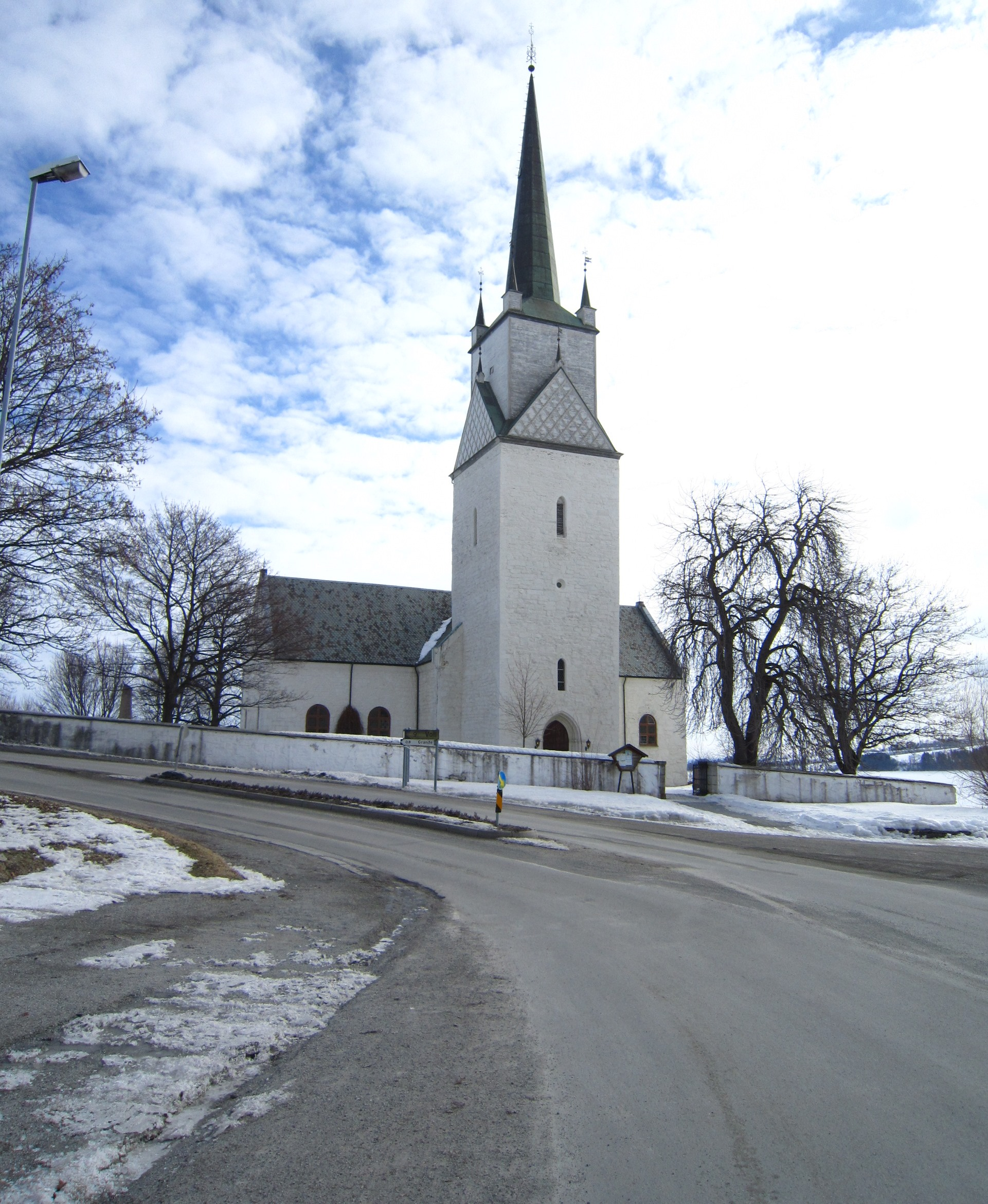 Nes kirke i Ringsaker med fylkesvei 1706 foran